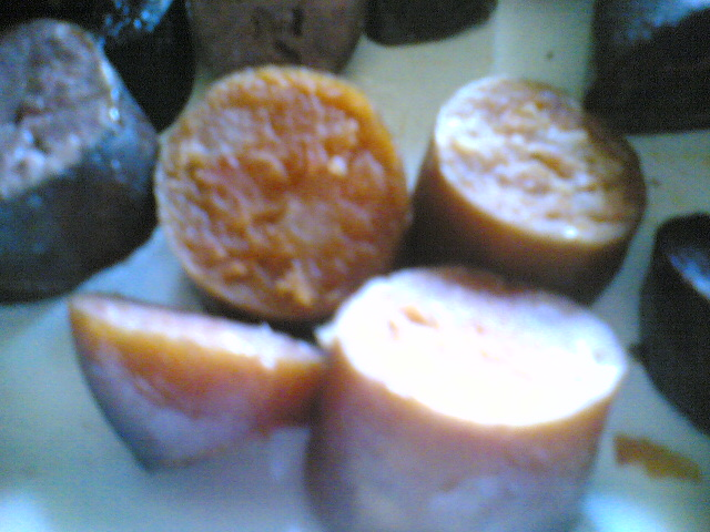 Farinheira, a portuguese sausage